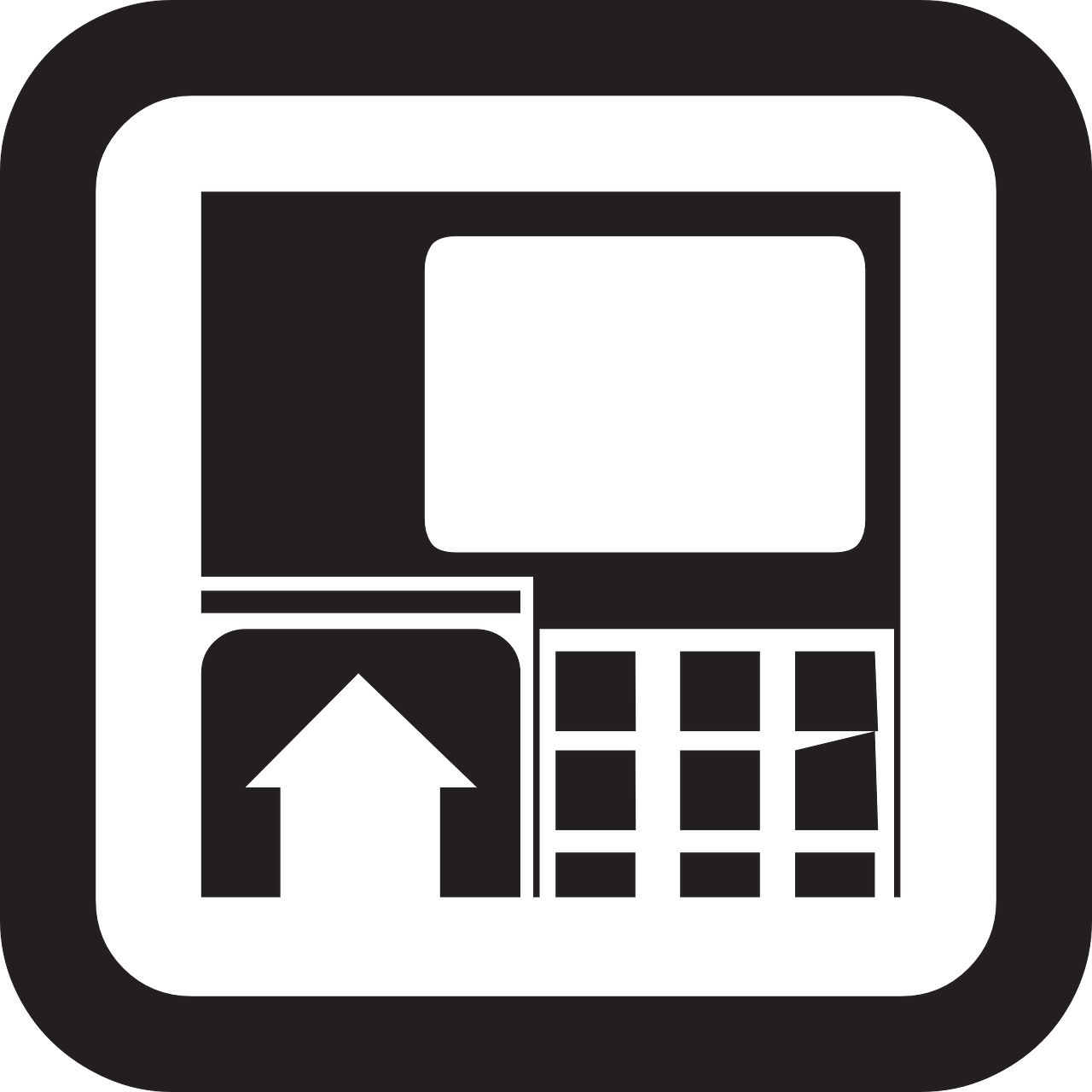 logo ATM